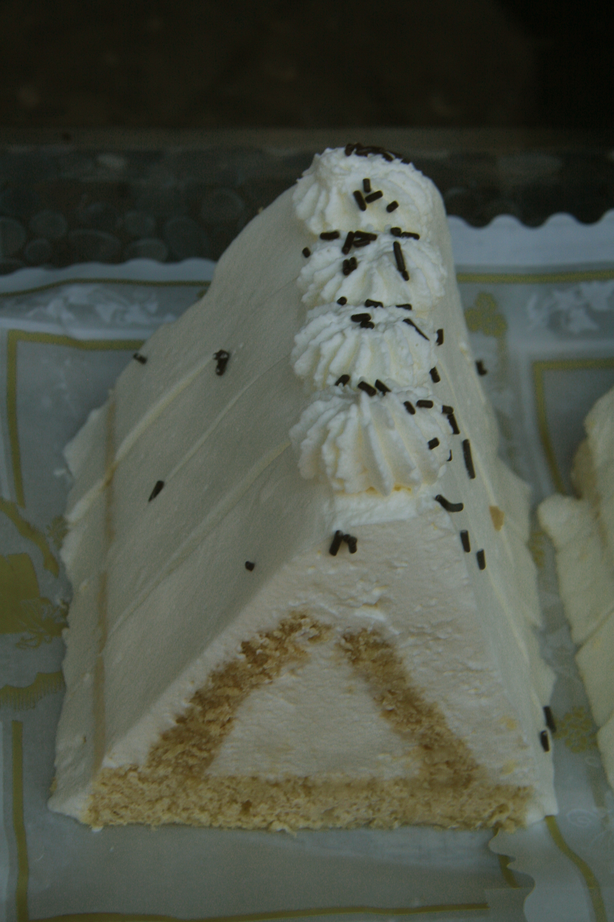 Rinas de nata